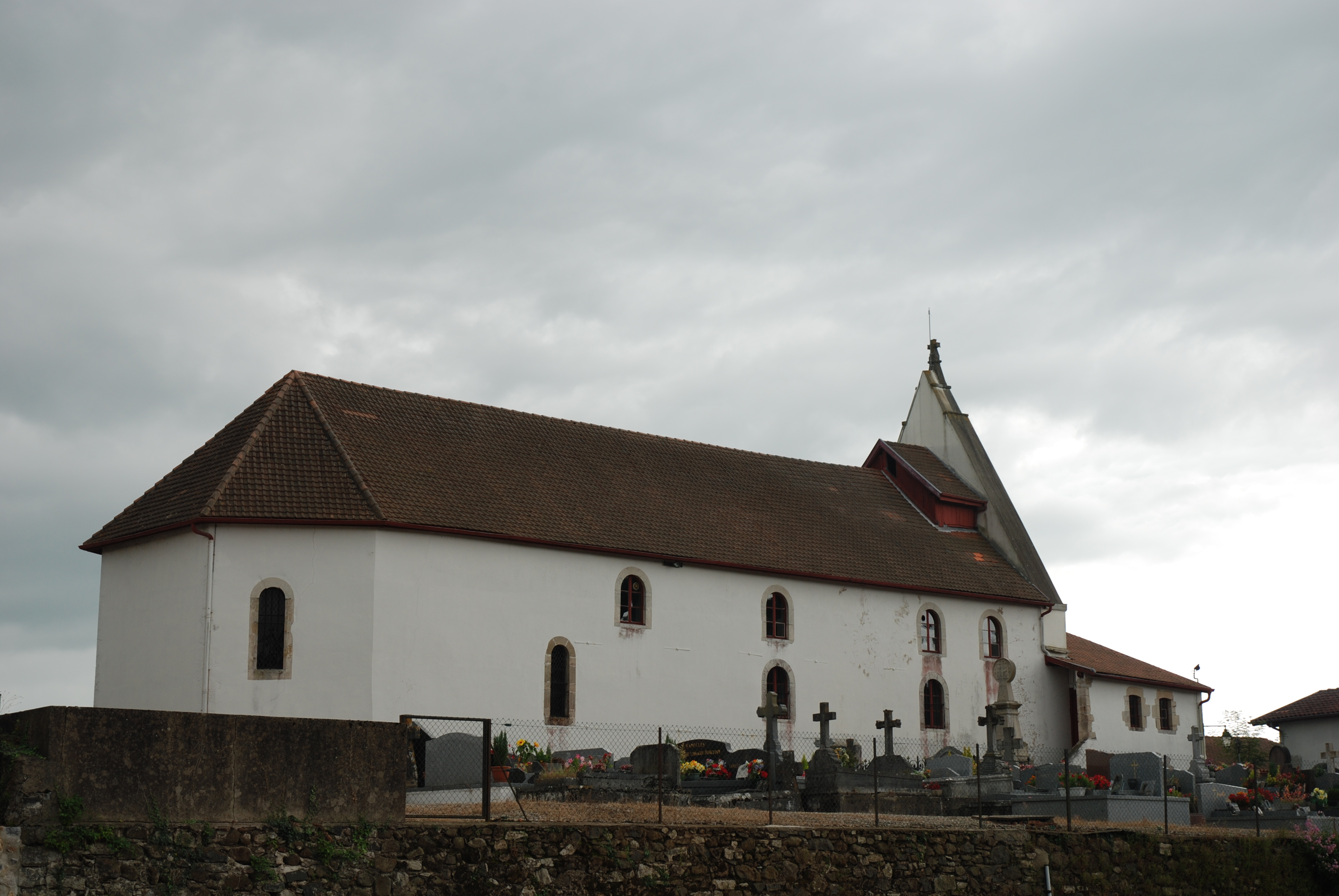 Villefranque, église Saint-Jean-Baptiste